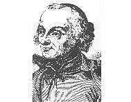 Incisione di Francesco Saverio Quadrio del XVII